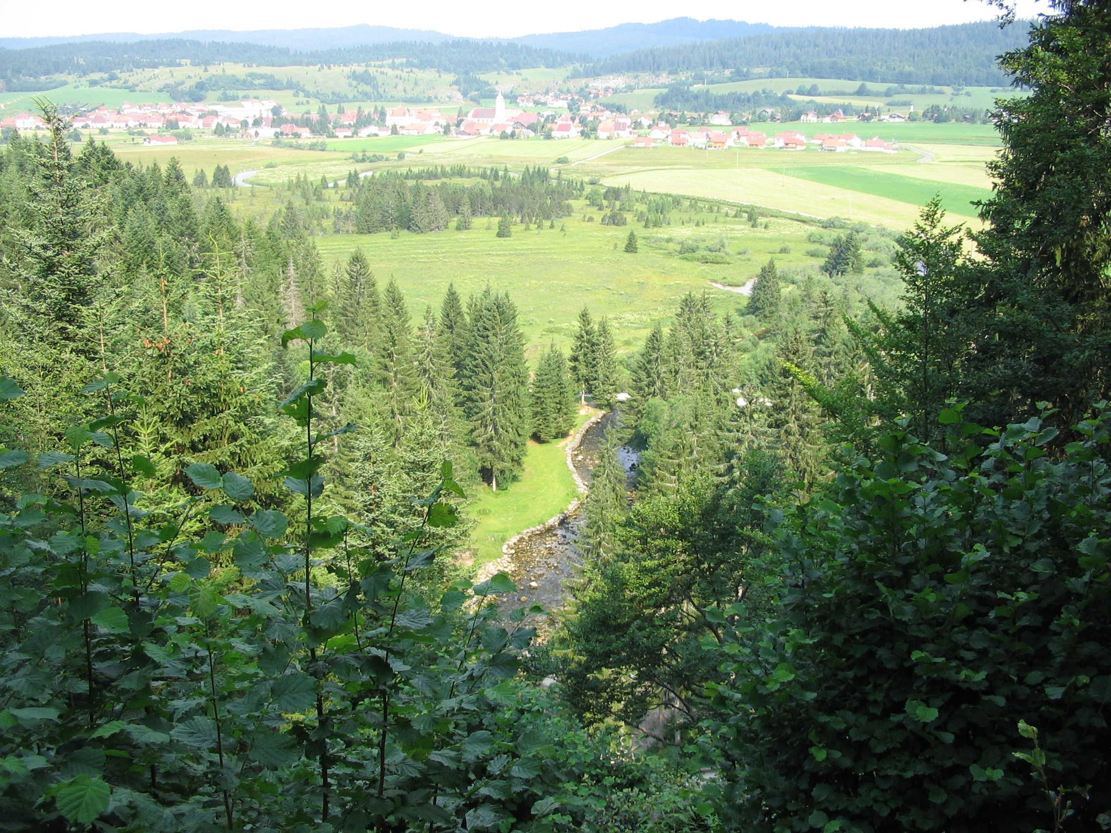 self made